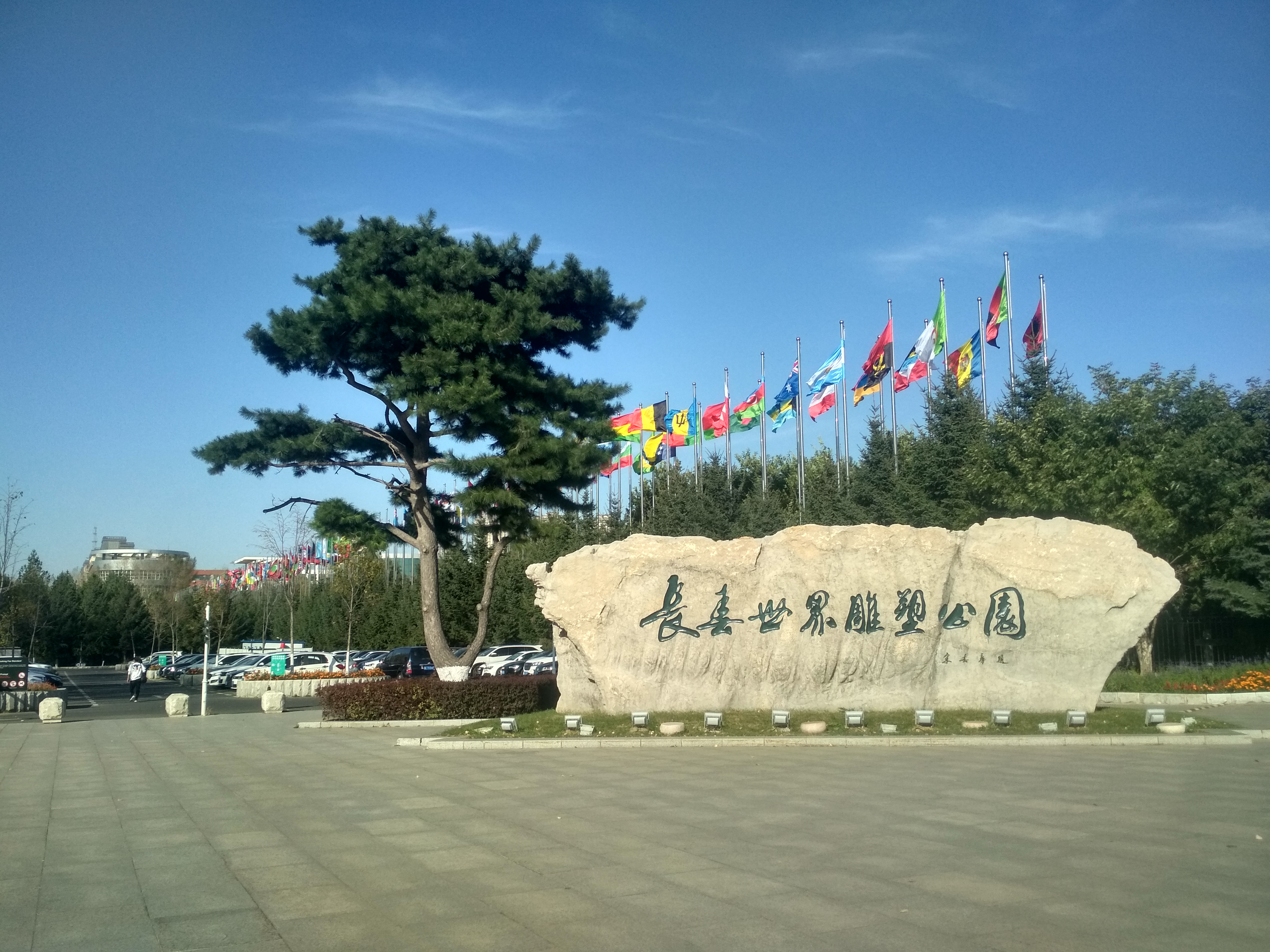 中文（中国大陆）: 长春世界雕塑公园